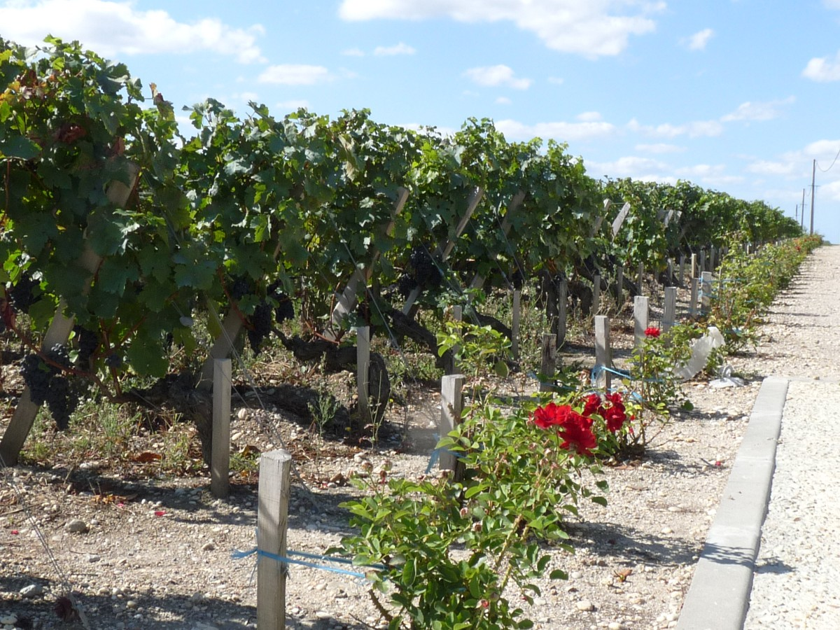 Cos d'Estournel, St-Estèphe, Gironde, France. Vignes et roses en bout de rangée